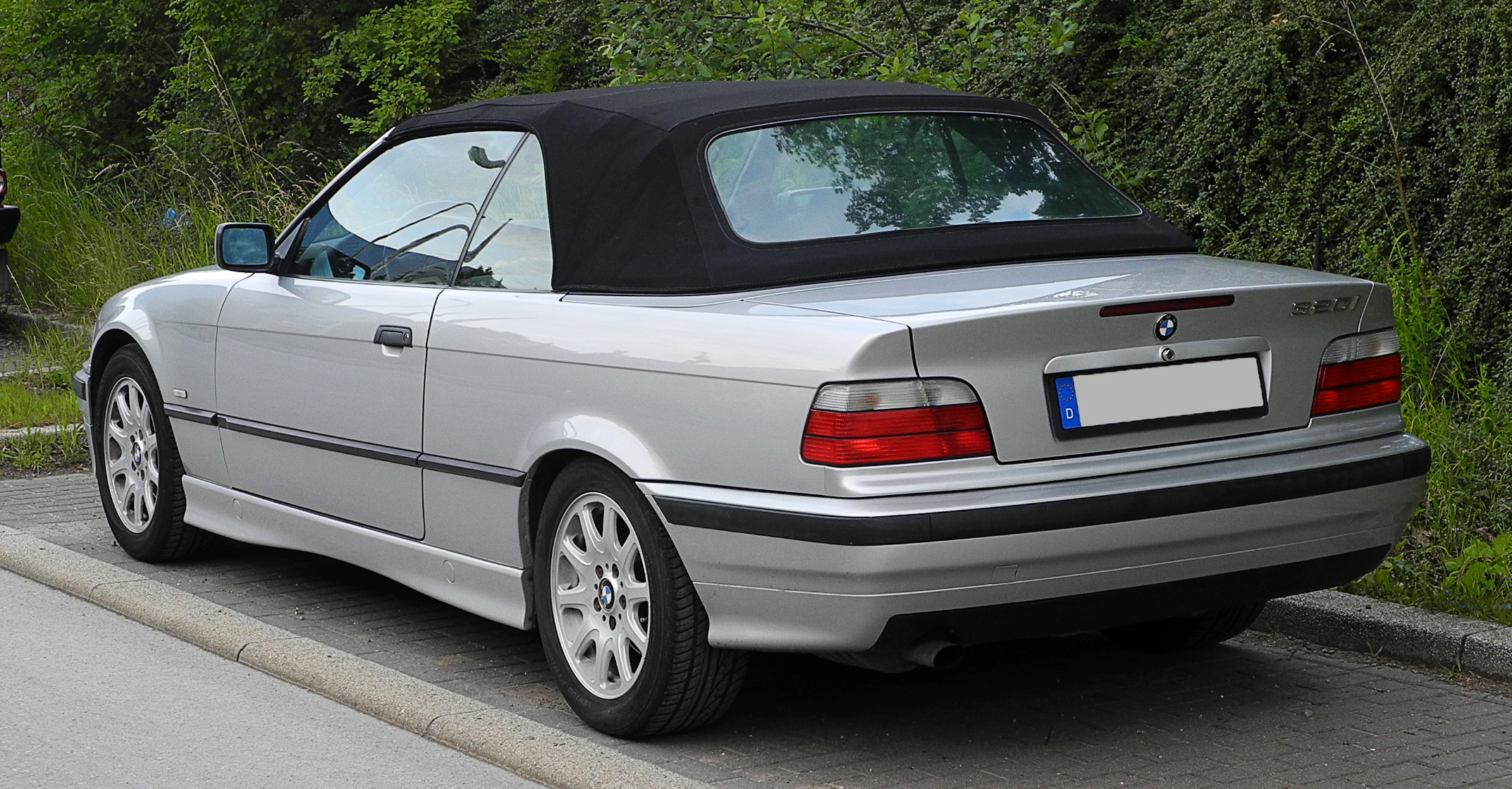 BMW 320i Cabriolet (E36 2C, Facelift)